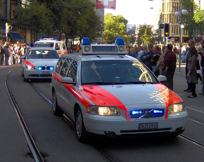 Verschiedene Standardfahrzeuge der Stadtpolizei Zürich